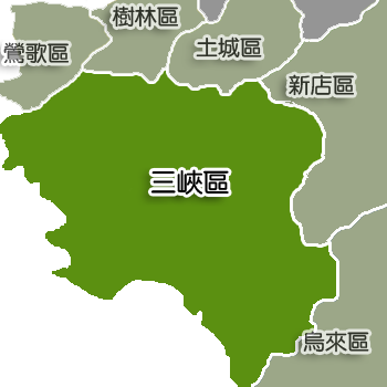 三峽區相對位置